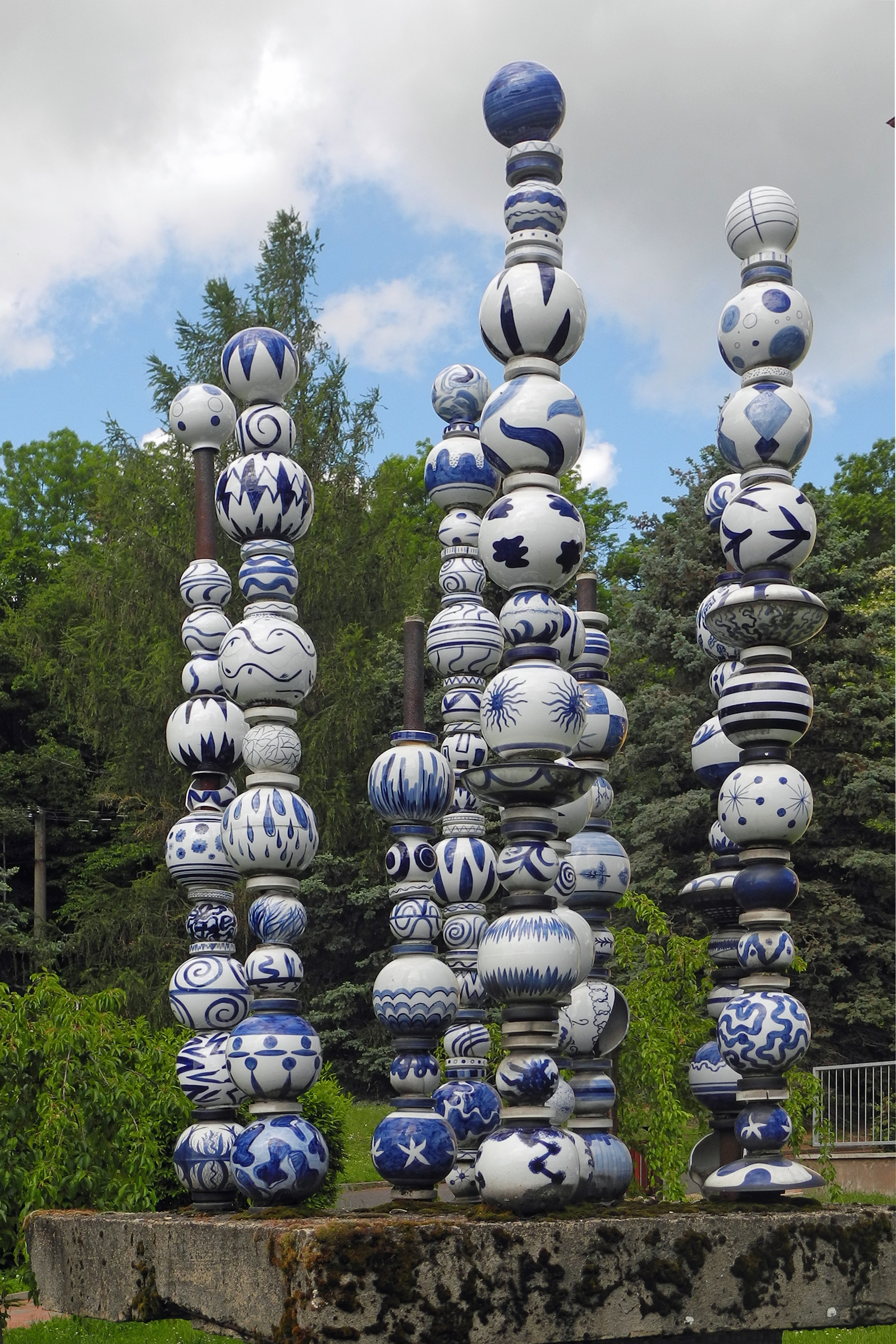 Porzellandenkmal in Eichwald – Dubí, Sídliště Družba